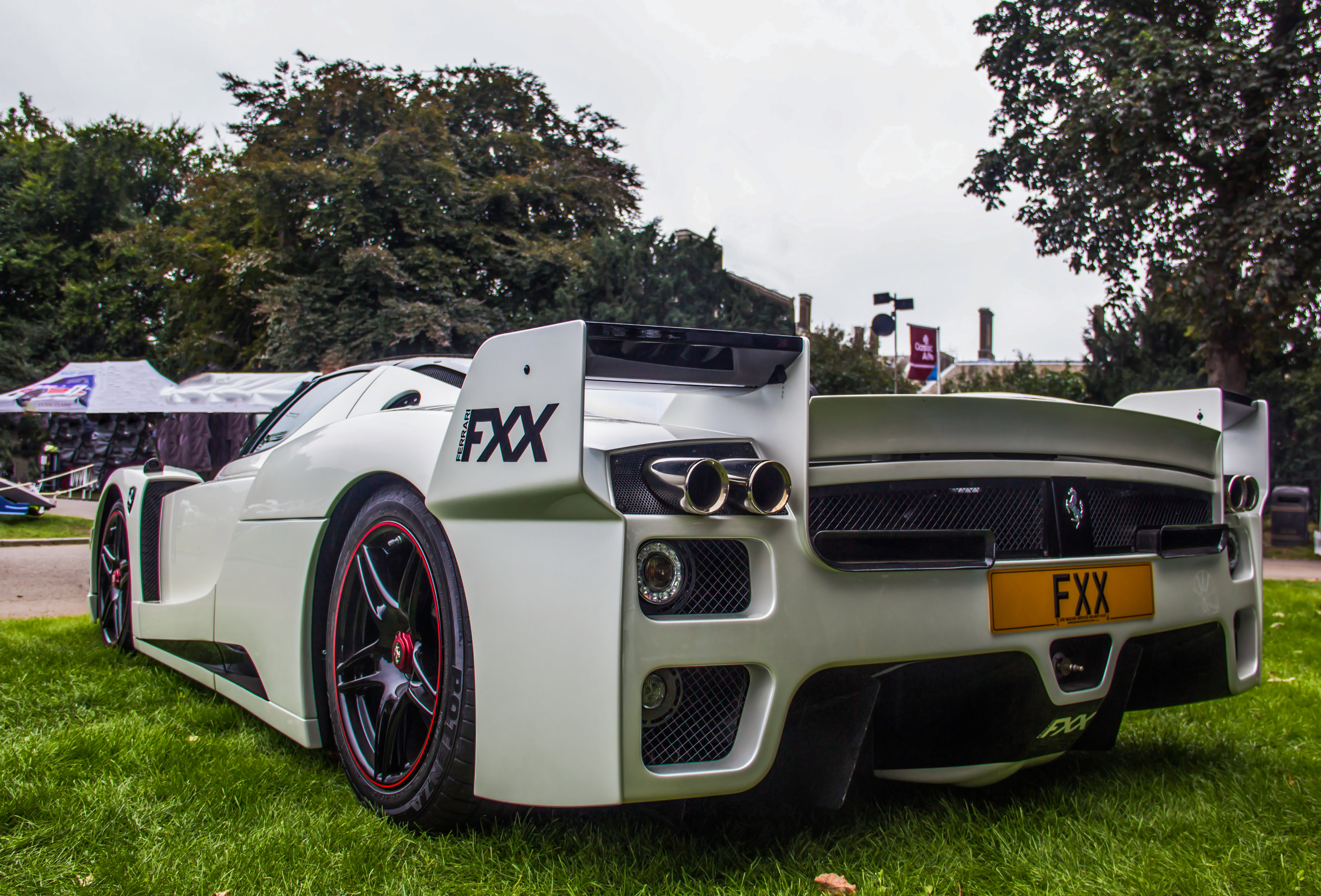 Ferrari FXX